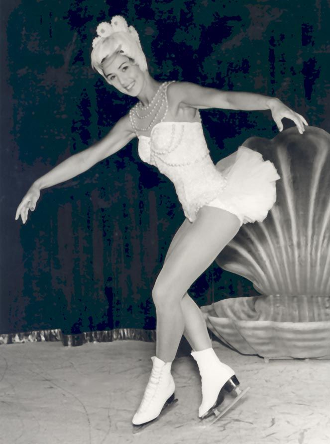 Eva Pawlik im Jahr 1959